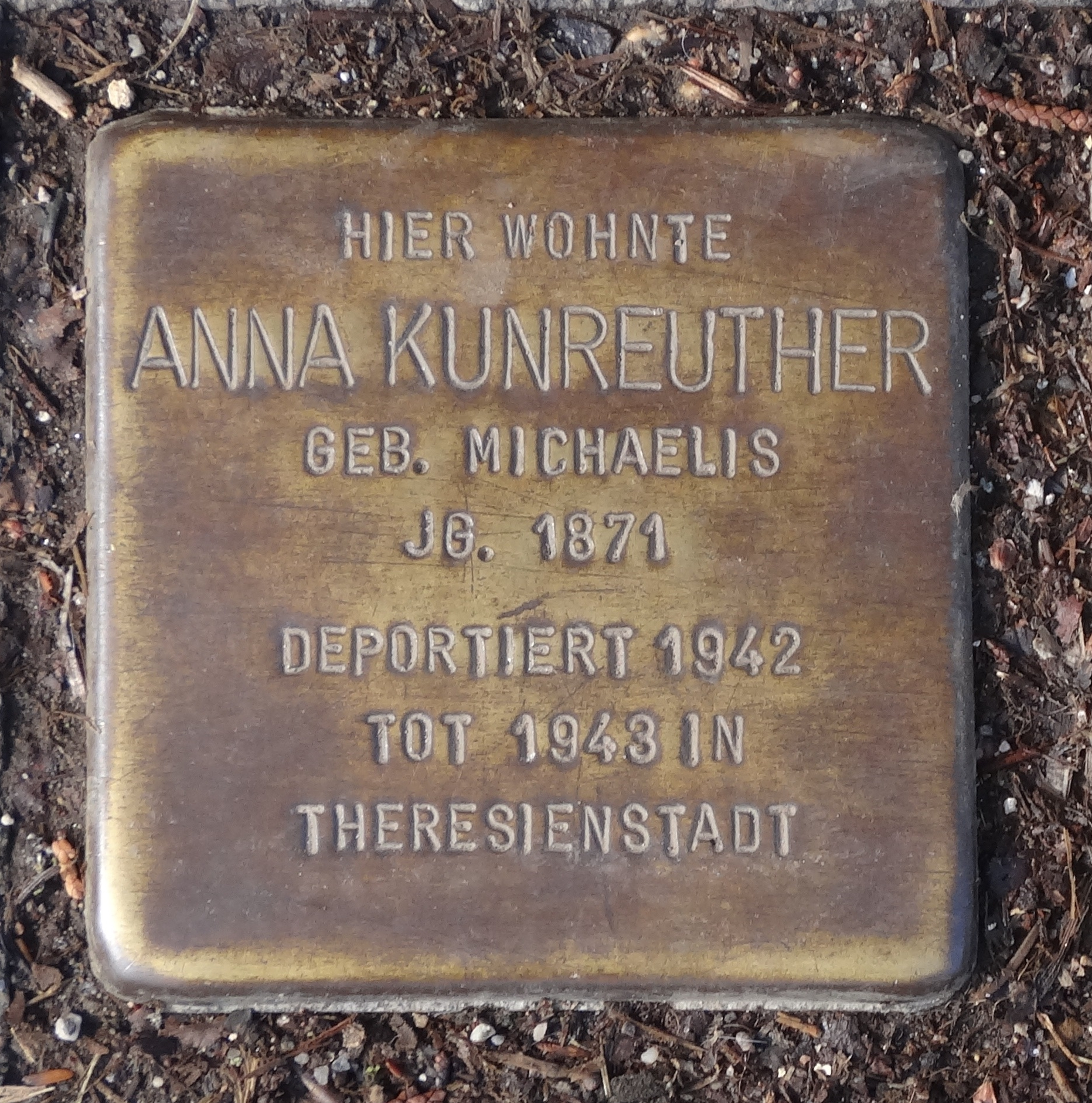 Stolperstein in Gotha, Friedrichstr. 14, für Anna Kunreuther